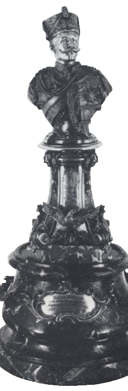 Ehrenpreis von Kaiser Wilhelm II für den Sieger des Distanzrittes Wien-Berlin 1892